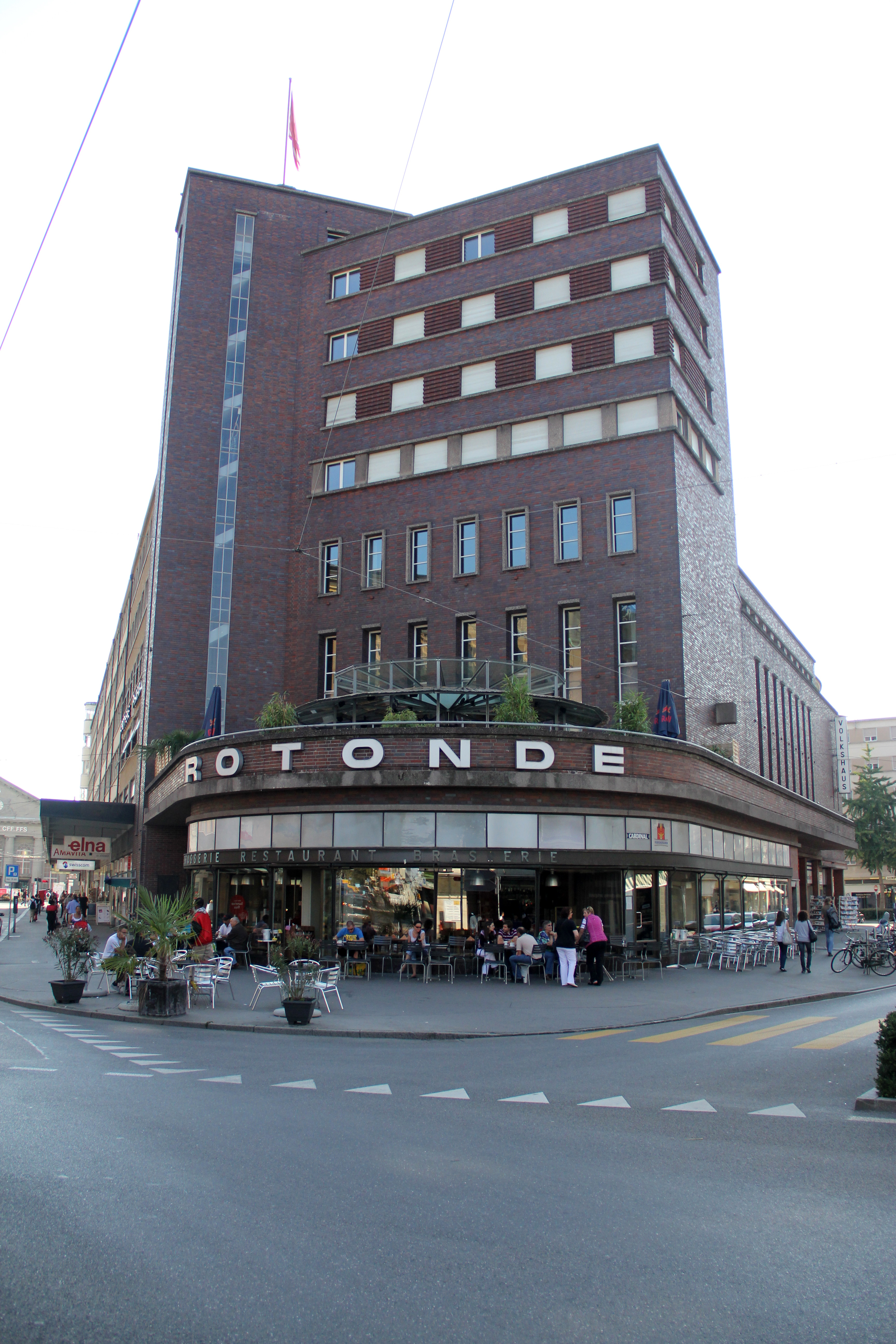 Frontansicht des Bieler Volkshauses